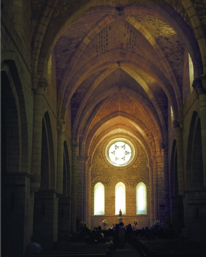 Irantzuko monasterioa